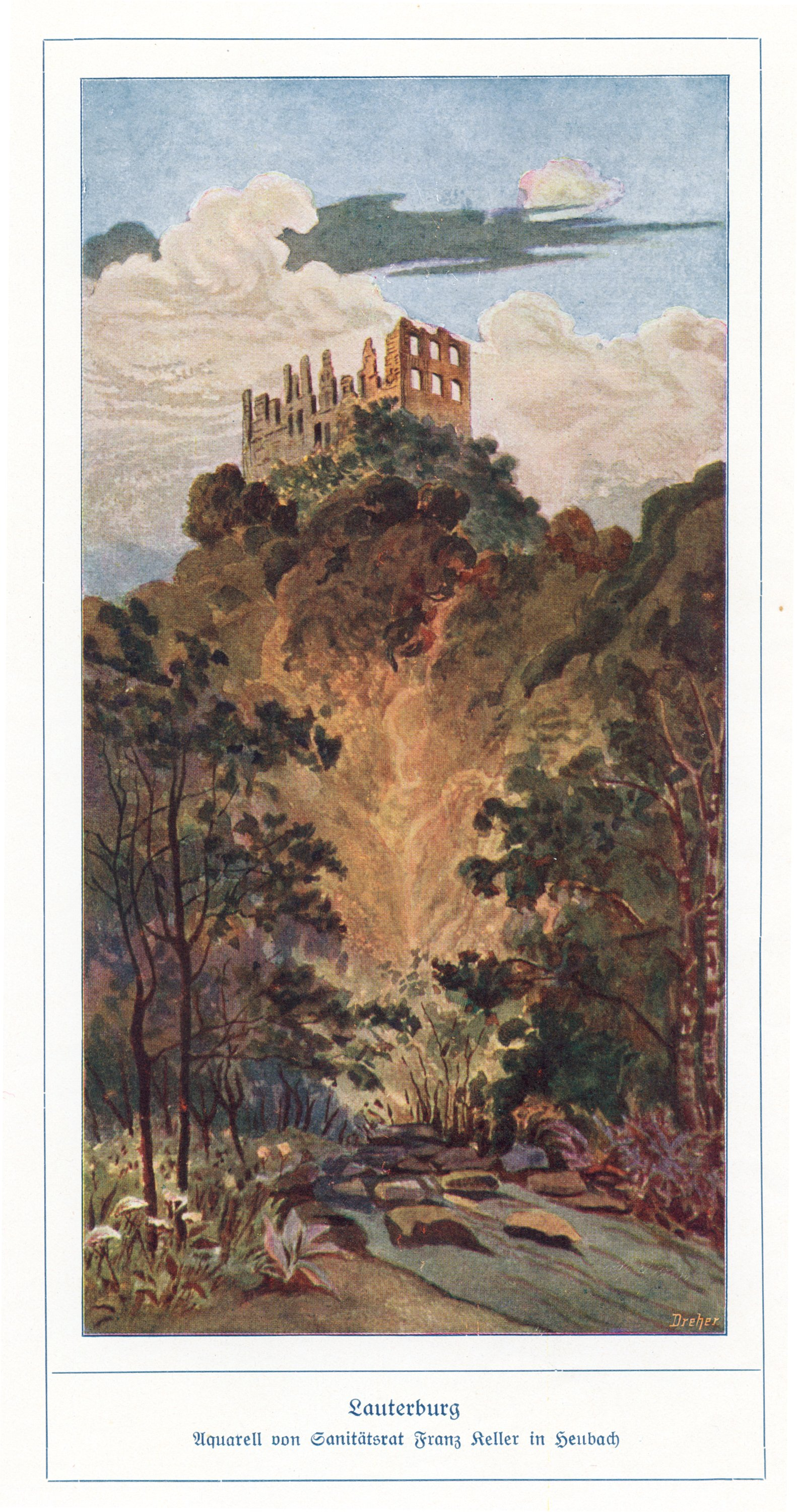 Lauterburg Aquarell von Sanitätsrat Franz Keller in Heubach